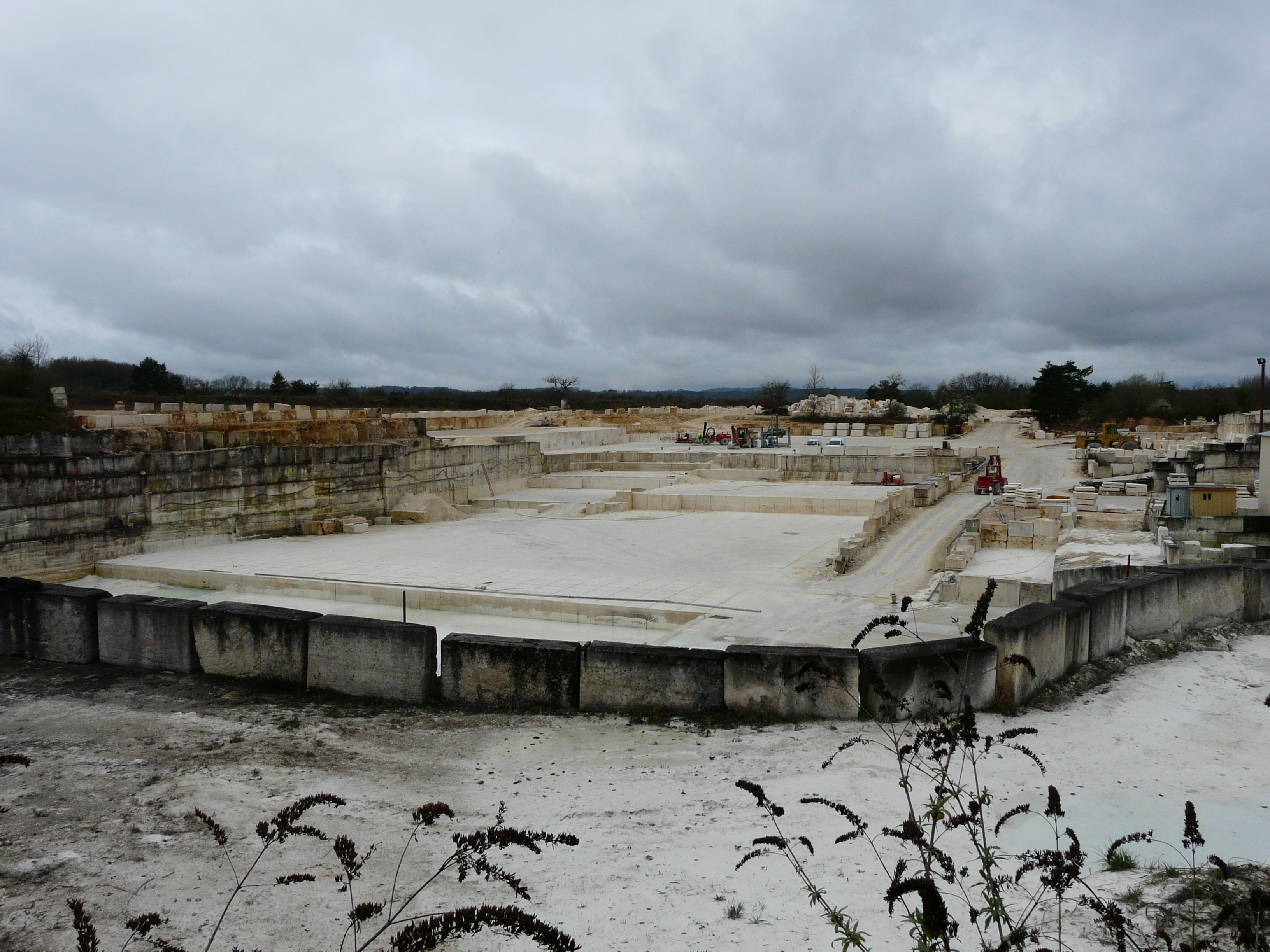 Carrière de calcaire à proximité du lieu-dit Maison Neuve, Paussac-et-Saint-Vivien, Dordogne, France.